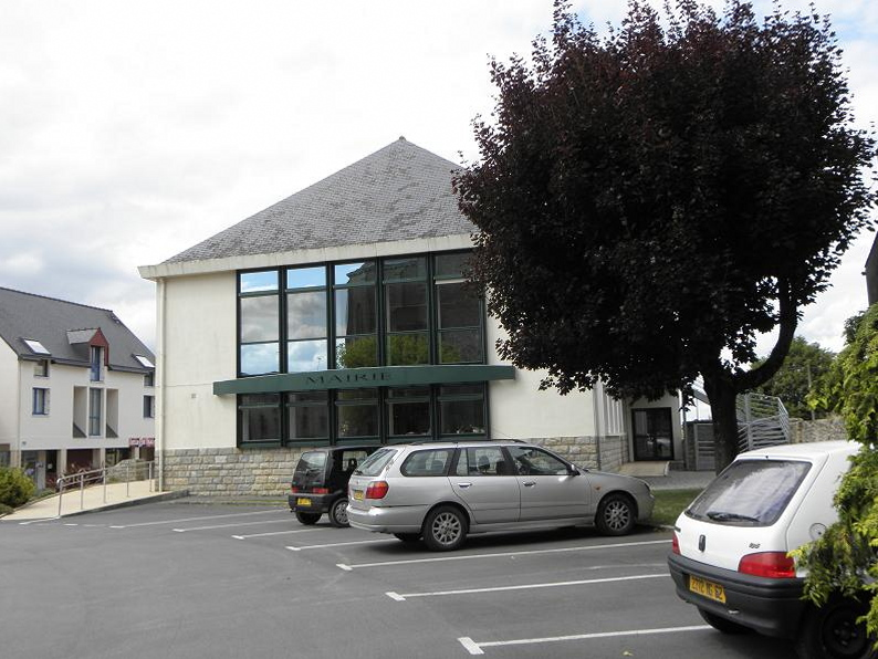 Mairie de Bains-sur-Oust (35).